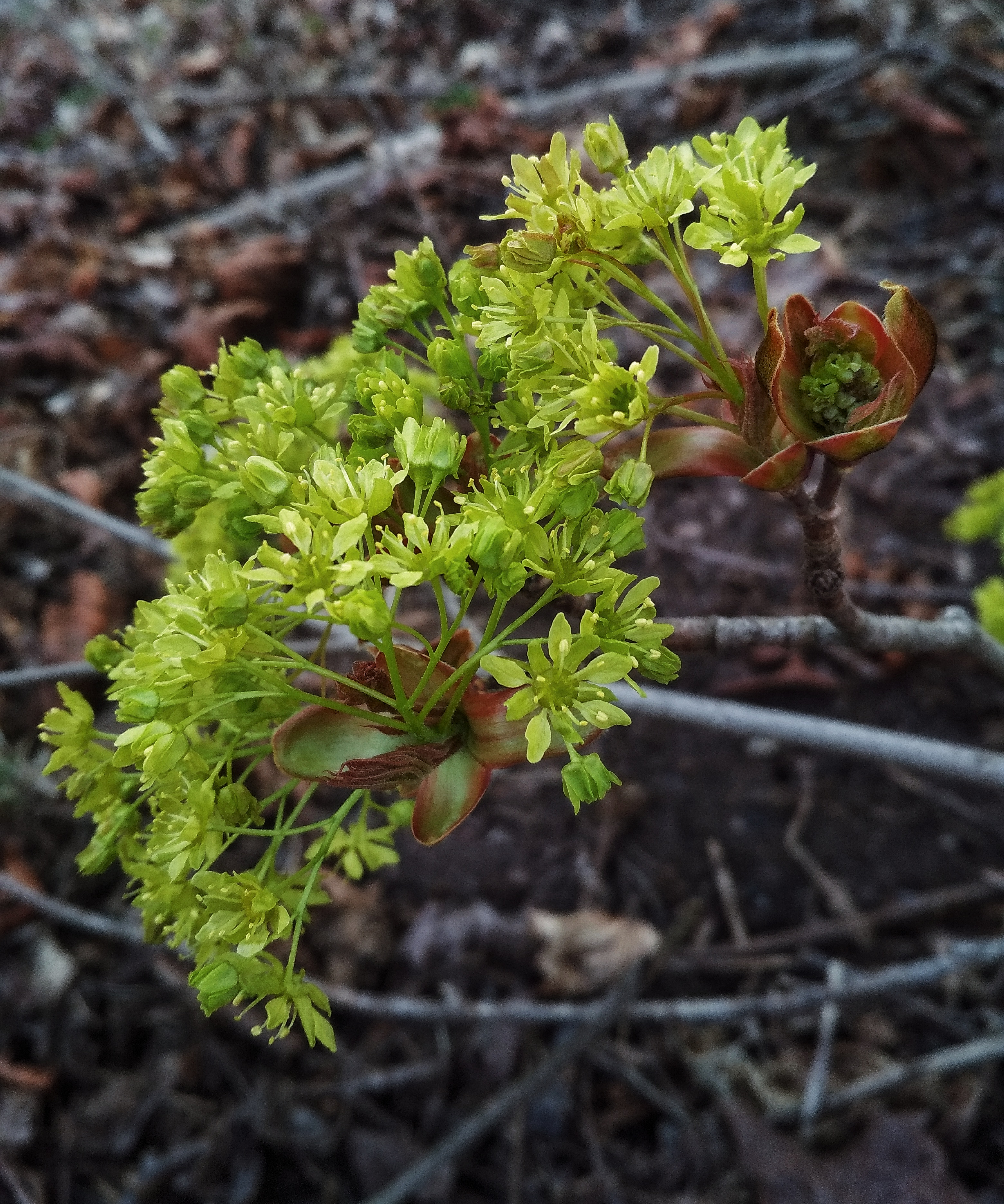 Acer platanoides – flowers